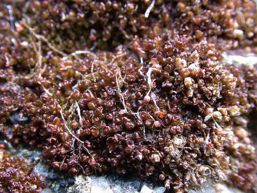 Plante